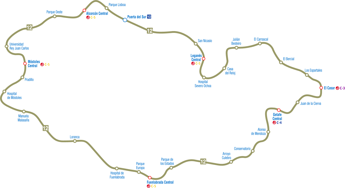 Recorrido de la línea 12 del Metro de Madrid